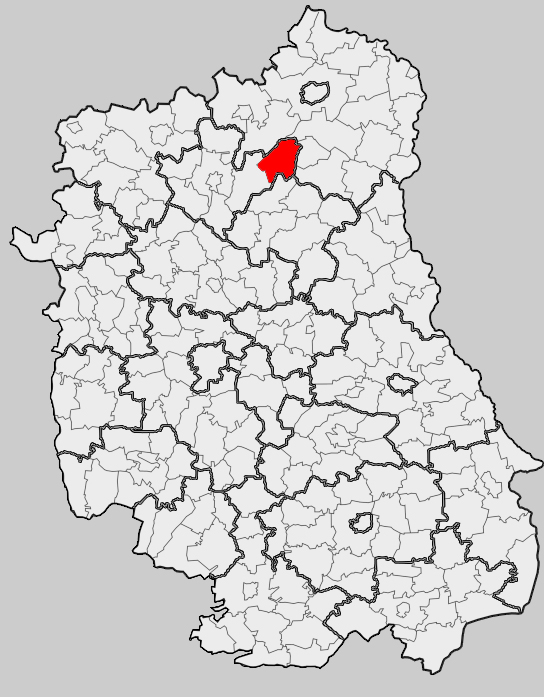 Map of gmina Komarówka Podlaska, Radzyń Podlaski county, Lublin voivodship Mapa gminy Komarówka Podlaska, powiat radzyński, województwo lubelskie